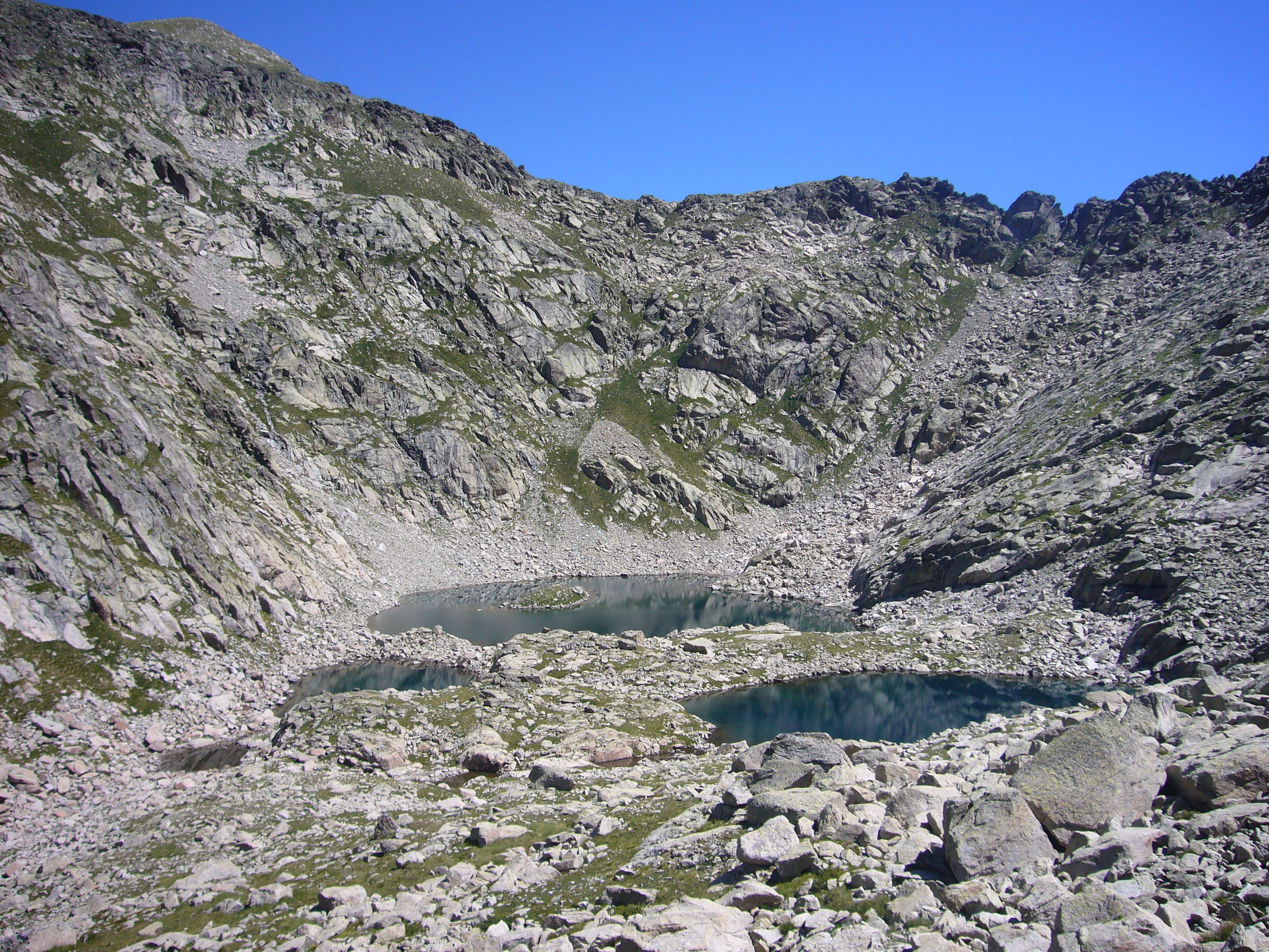 Estanys Gelats del Bergús i Coll del Bergús; Espot, Pallars Sobirà, Catalunya